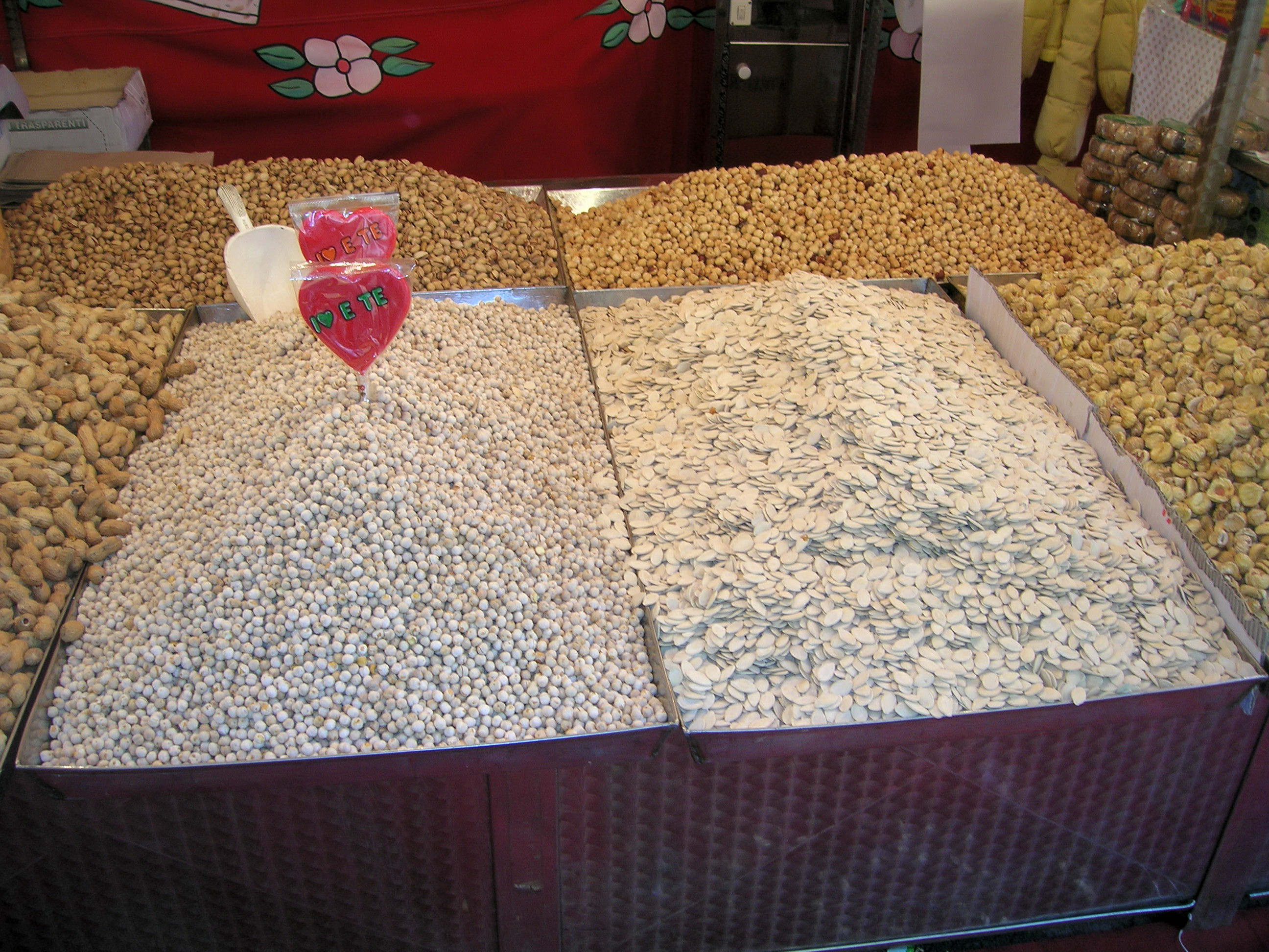 Folklore siciliano